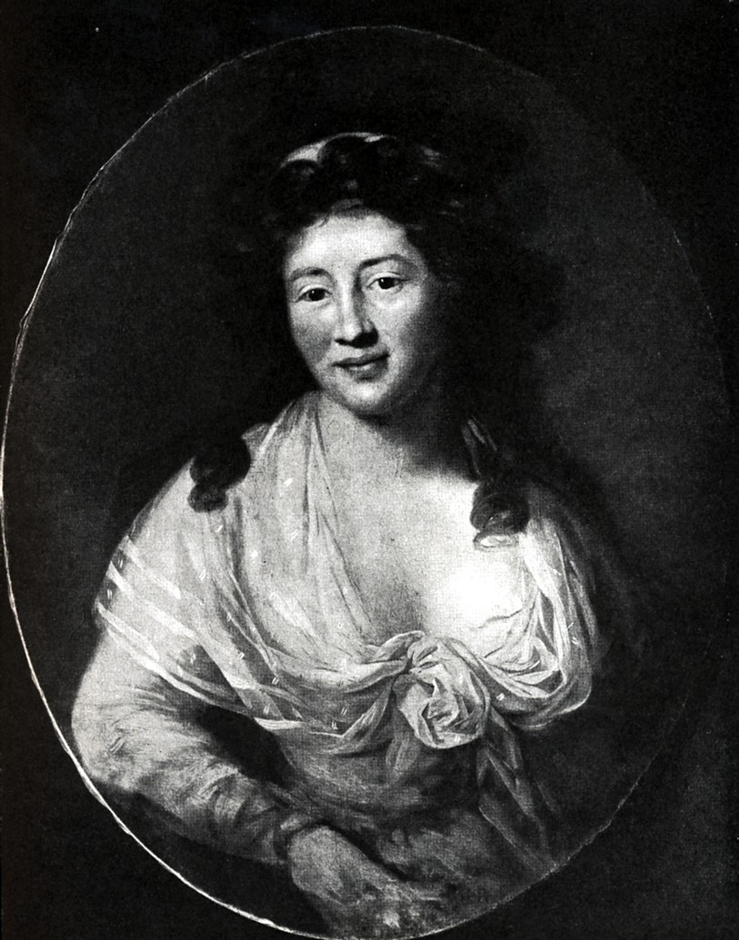 Portrait der Malerin Dorothea Stock.